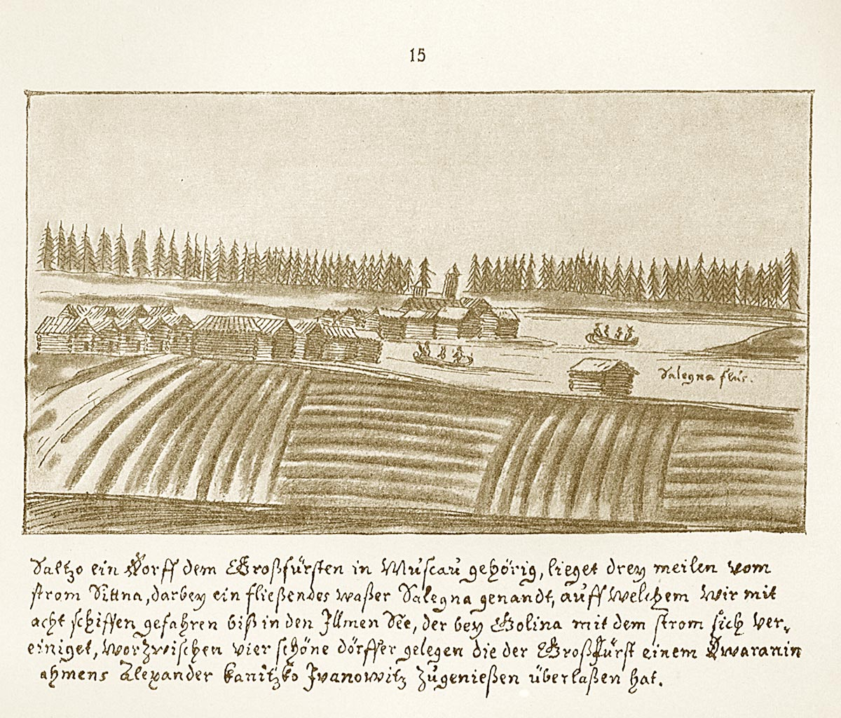 Сольца